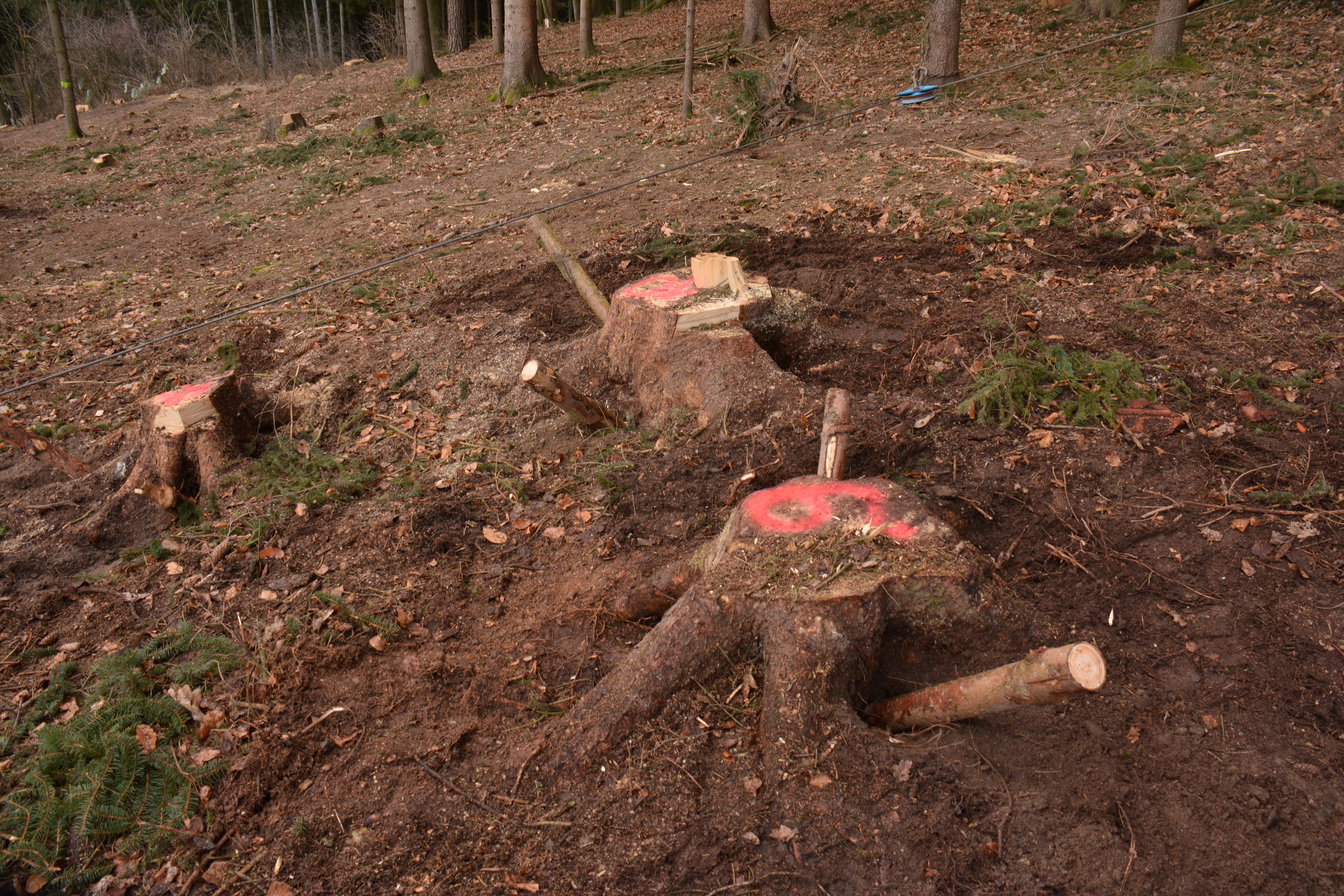 Geladene Bohrlöcher bei den Wurzelstöcken - Sprengübung von Feuerwehrleuten an Wurzelstöcken in Treffling, Mühlviertel